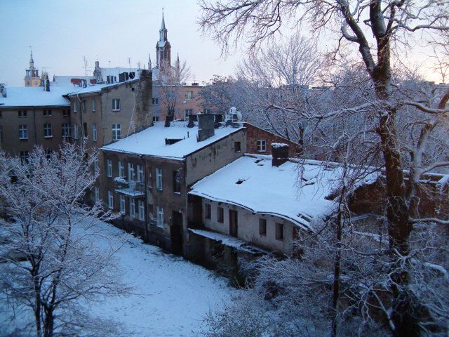 Kalisz - widok zimą na katedrę i ratusz z przewagą widoku zapuszczonych domów.